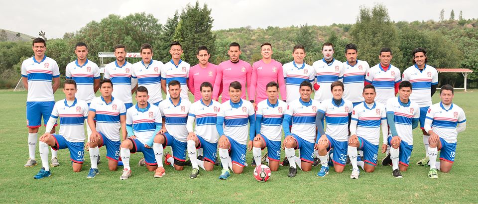 Club Tepatitlan